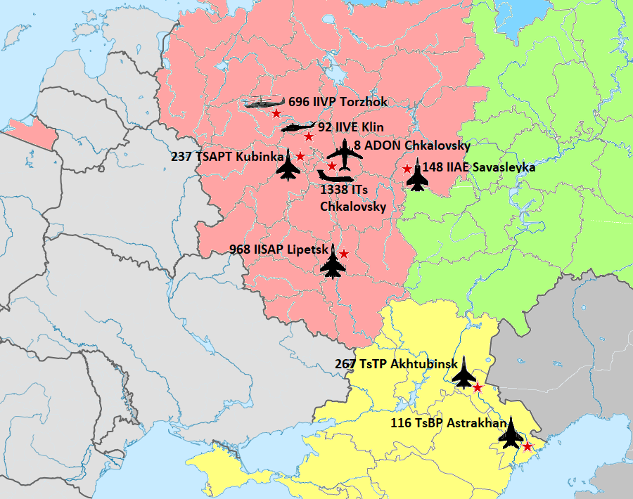 Mapa Militar Rusia Unidades Comando Central VVS 2017